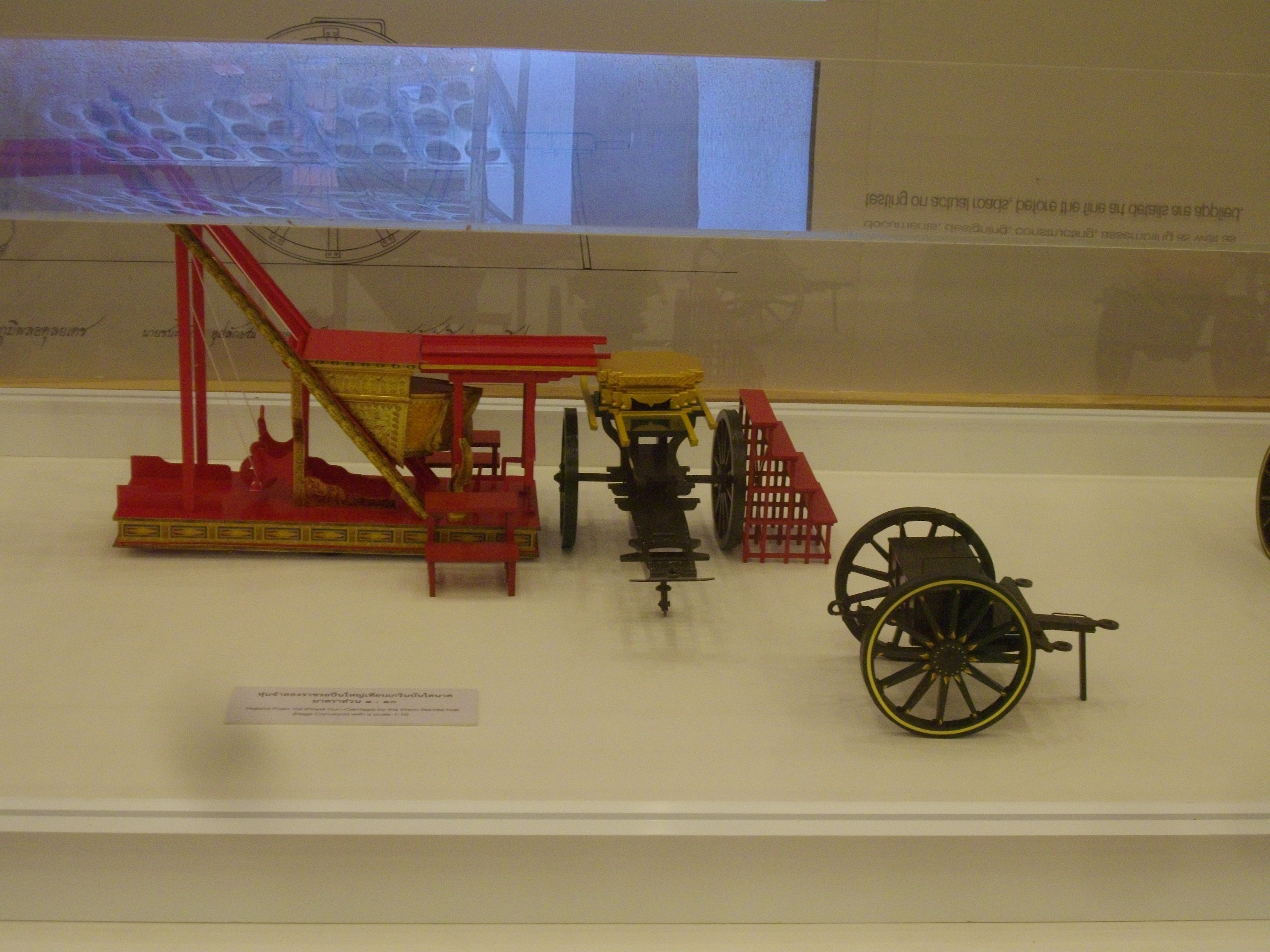 แบบจำลองราชรถปืนใหญ่ขณะเทียบเกรินบันไดนาค ขนาดสัดส่วน 1:10จัดแสดงในนิทรรศการงานพระราชพิธีถวายพระเพลิงพระบรมศพ พระบาทสมเด็จพระปรมินทรมหาภูมิพลอดุลยเดช ระหว่งวันที่ 2-30 พฤศจิกายน 2560 ณ พระเมรุมาศ ท้องสนามหลวง กรุงเทพฯ